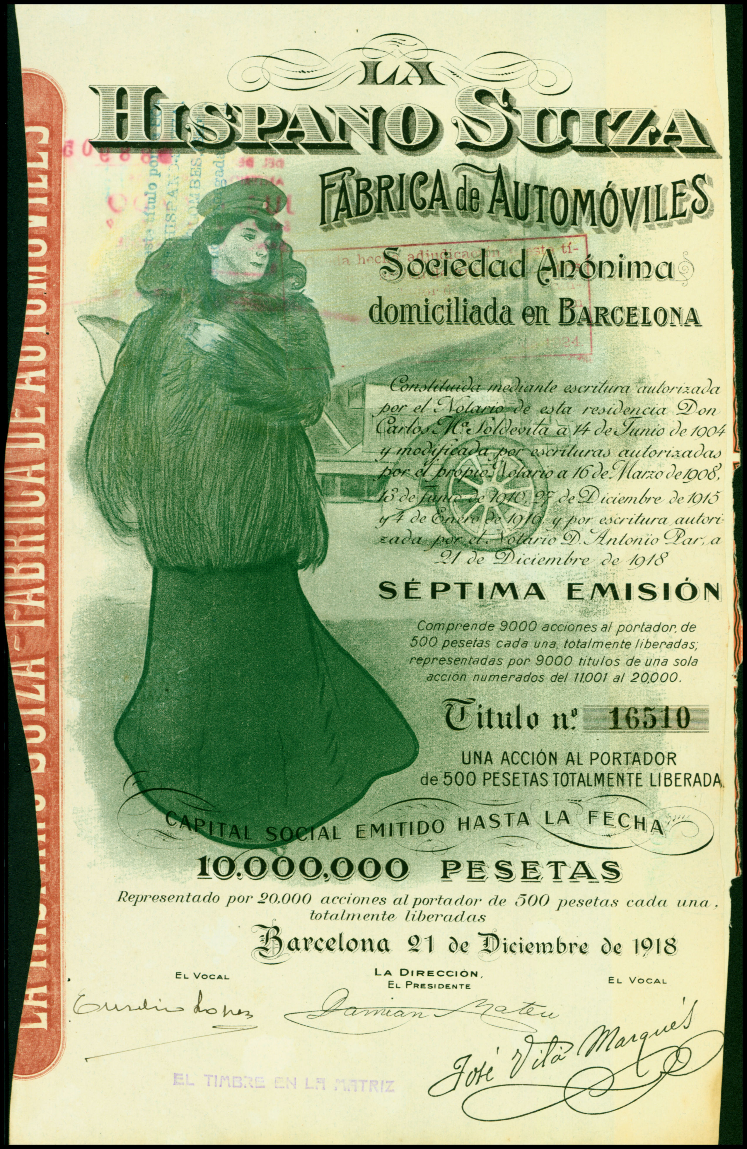 Aktie der Hispano Suiza Fabrica de Automoviles SA vom 21. Dezember 1918